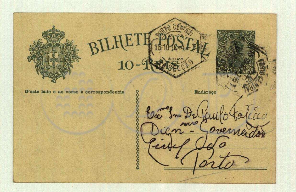 Bilhete postal a informar o Governador Civil do Porto da suspeita de existência de Jesuitas à guarda da famila Garret na rua de Cedofeita nº718, contra a lei.